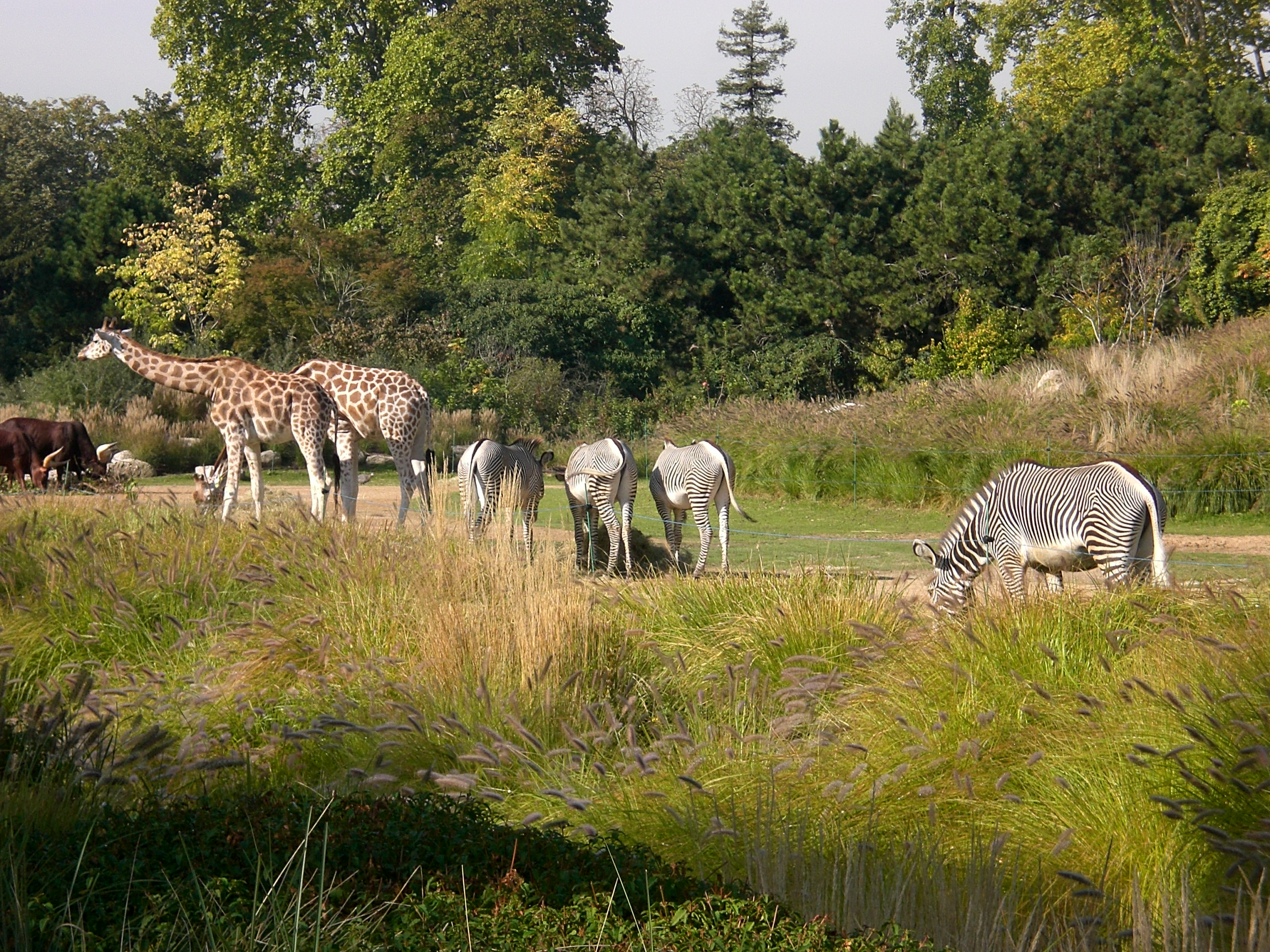 Animaux (girafes et zèbres) au sein du zoo au Parc de la Tête d'Or.